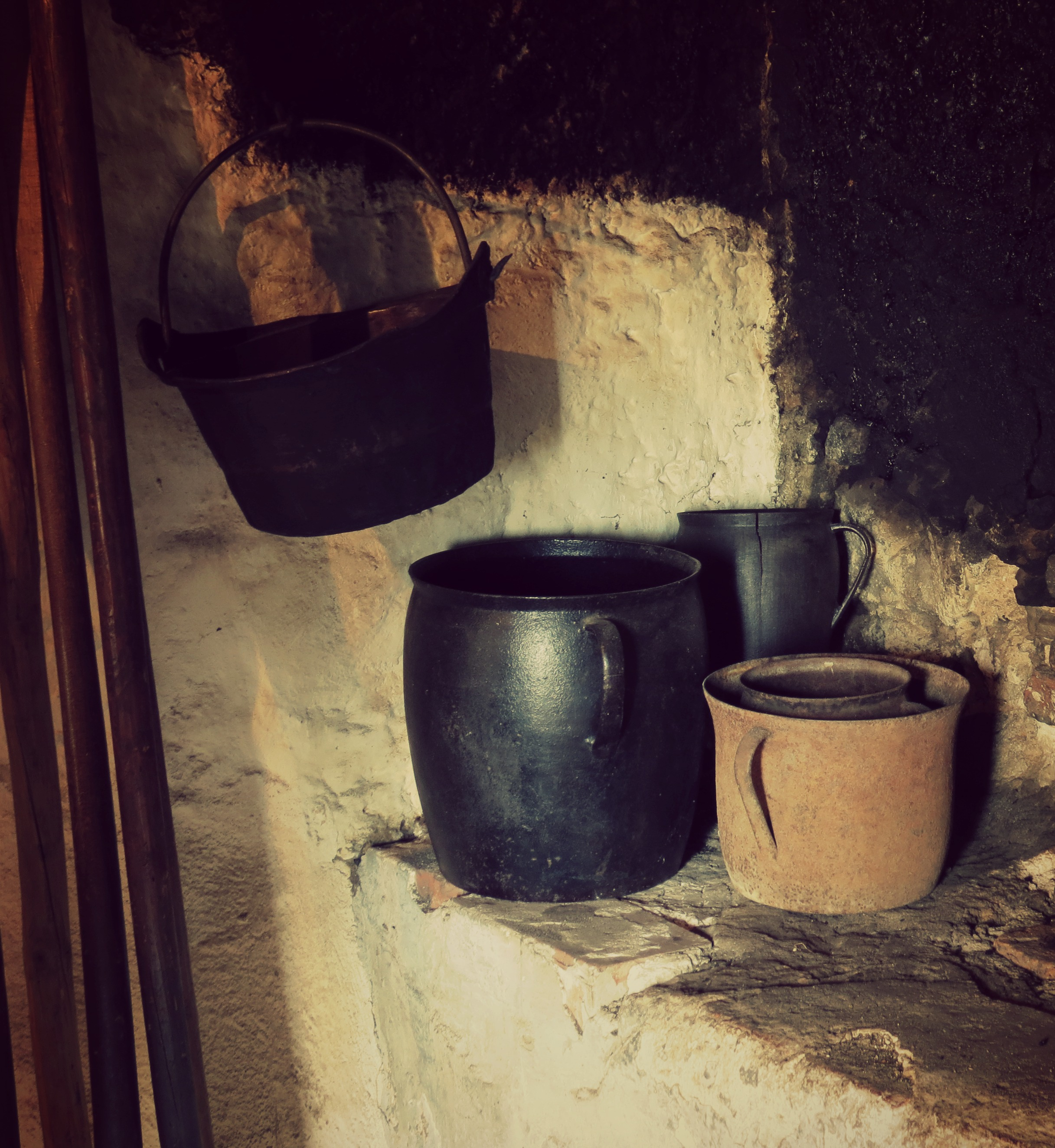 Črna kuhinja v Finžgarjevi rojstni hiši